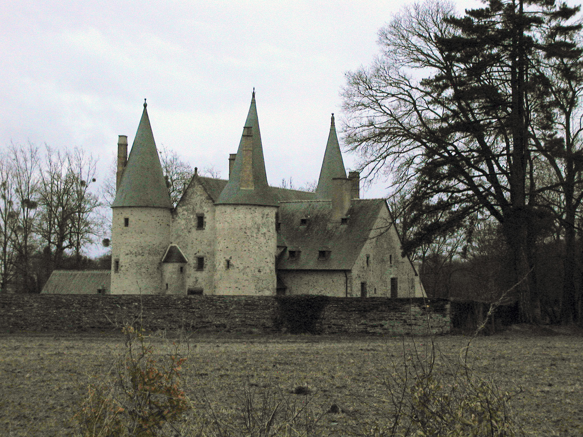 Description Manoir du Bois-Orcan de Noyal sur Vilaine avant restauration (2001) Date2001SourceOwn work by the original uploaderAuthorBernard SIMON Manoir du Bois-Orcan de Noyal sur Vilaine avant restauration (2001)